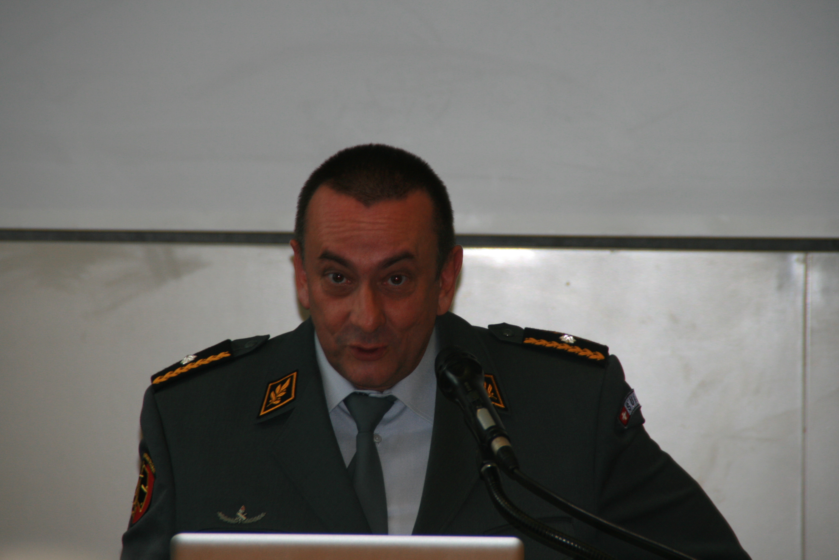 Br René Wellinger während der SOGART Herbsttage 2017